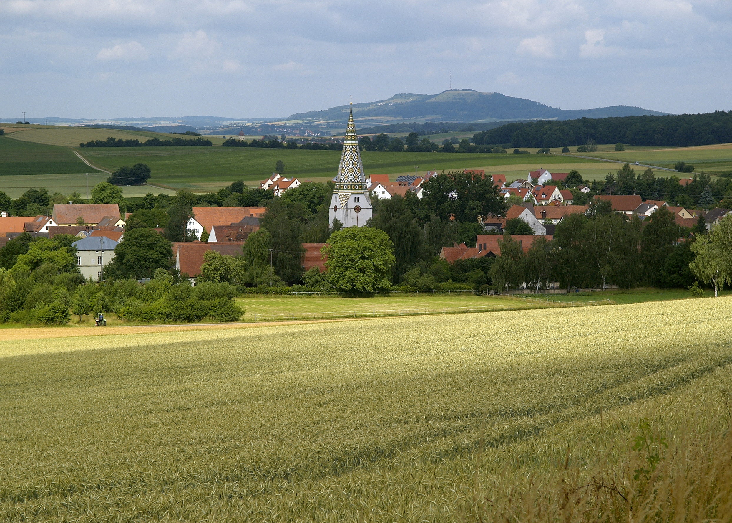 Blick vom Hahnenkamm über Ostheim zum Hesselberg